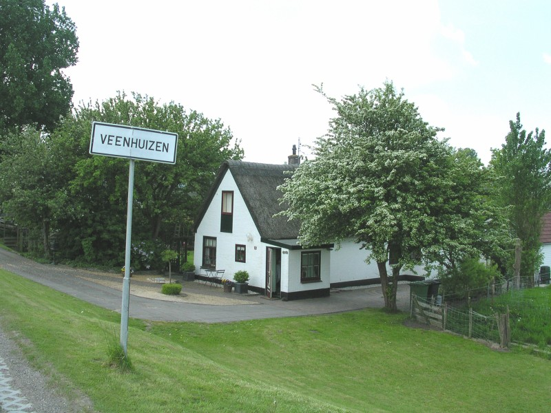 Dorpsingang van Veenhuizen, een huis aan de dijk. A house in Veenhuizen beside the dyke.